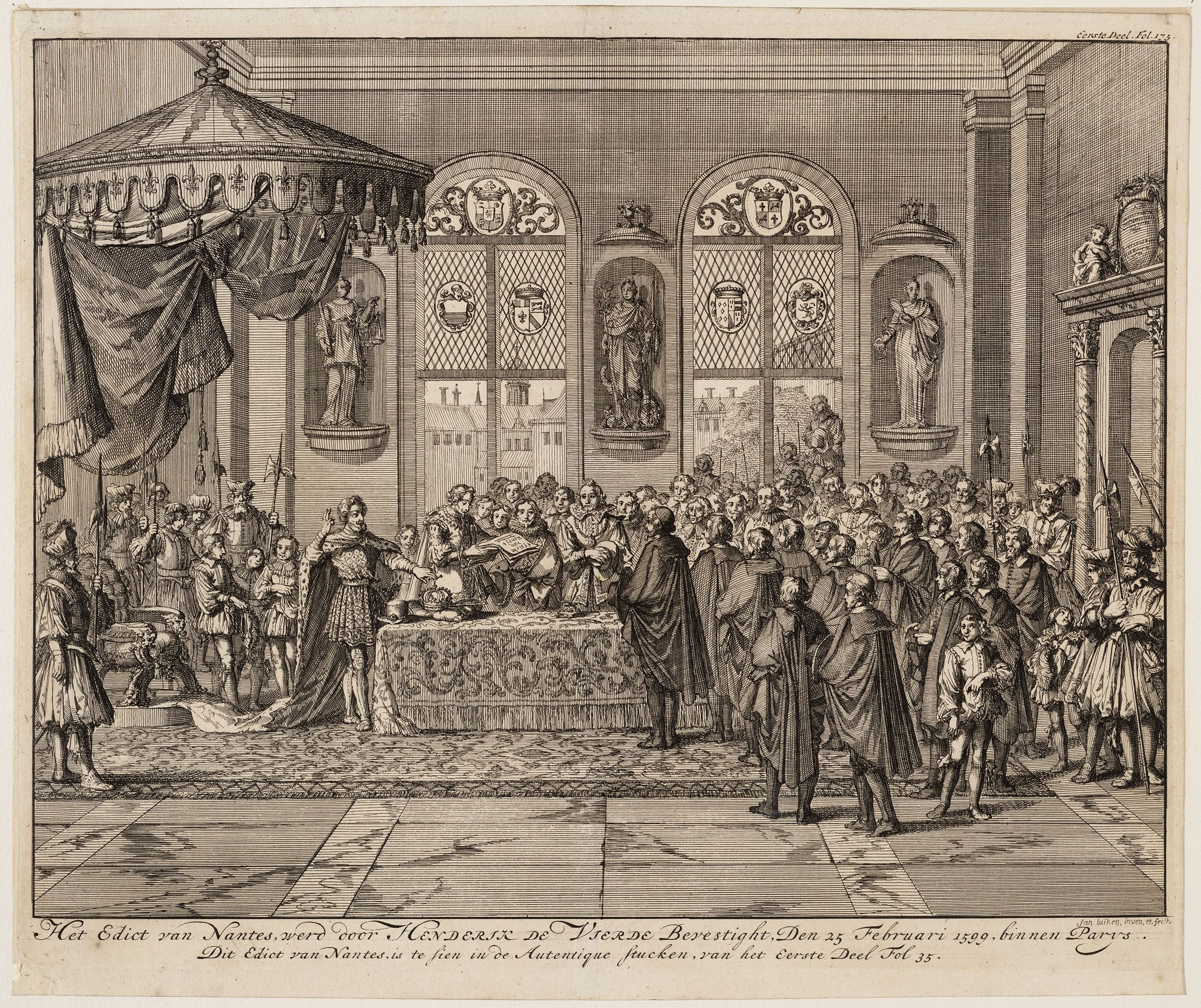 Proclamation de l'édit de Nantes par Henri IV.